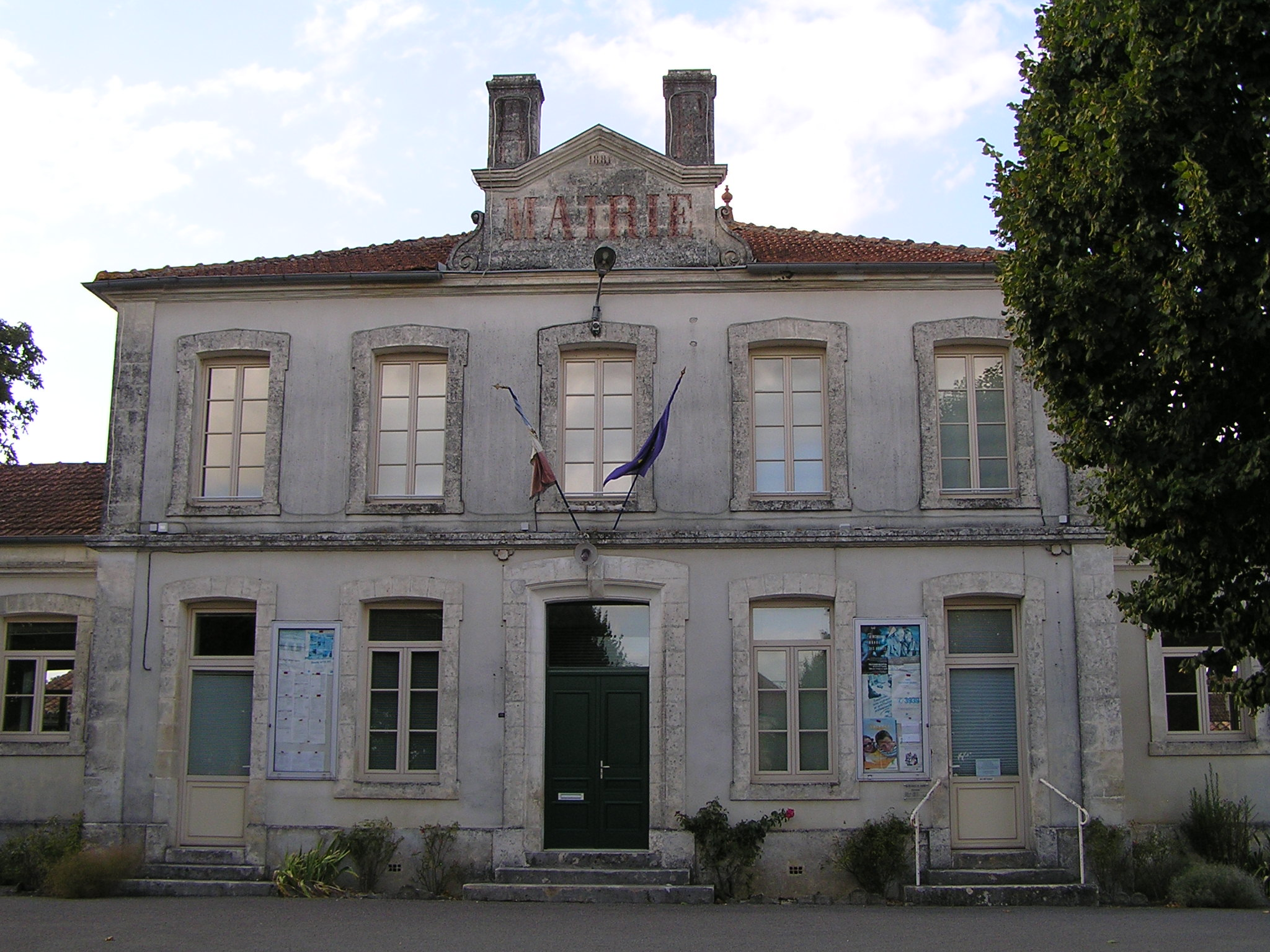 mairie de Coulgens